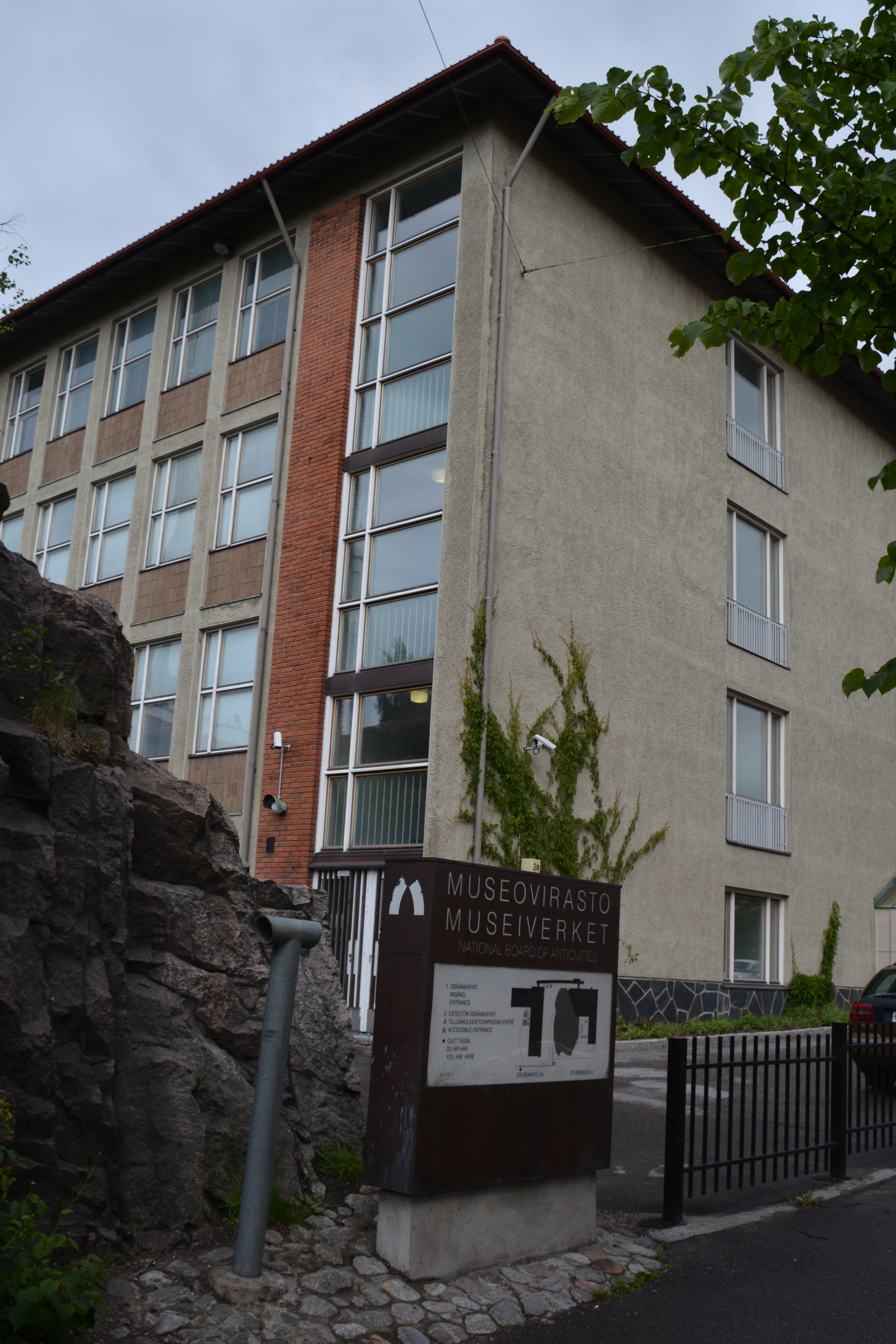 Museiverket, Helsingfors